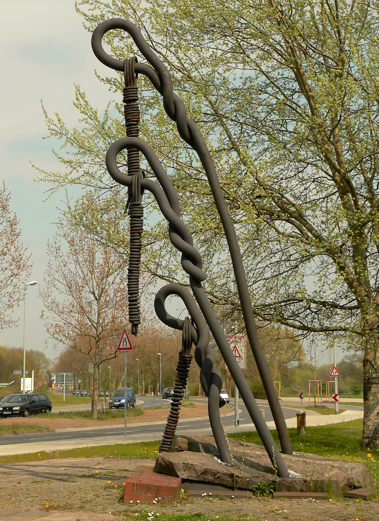 Zwangsarbeiter Mahnmal nahe ehemaliges Akkumulatorenwerk Stöcken